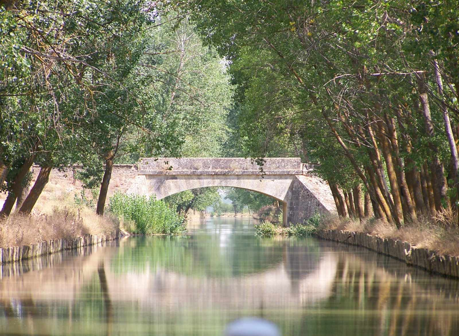 Es una foto de un puente del Canal de Castilla a bordo del barco Juan de Ulloa, está bien el viaje os lo recomiendo. Foto bajo licencia creative commons, la puedes copiar, modificar y distribuir, siempre que indiques el origen, y el trabajo derivado tenga la misma licencia. La foto la hice yo con mi cámara de fotos digital.